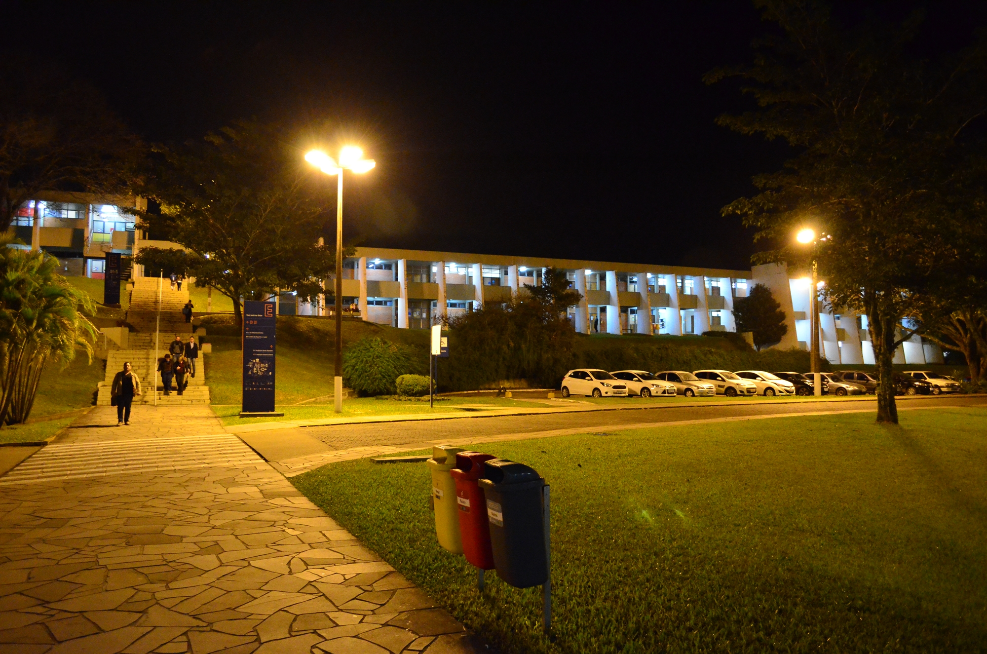 Salas de aula localizadas no setor E, Unisinos São Leopoldo